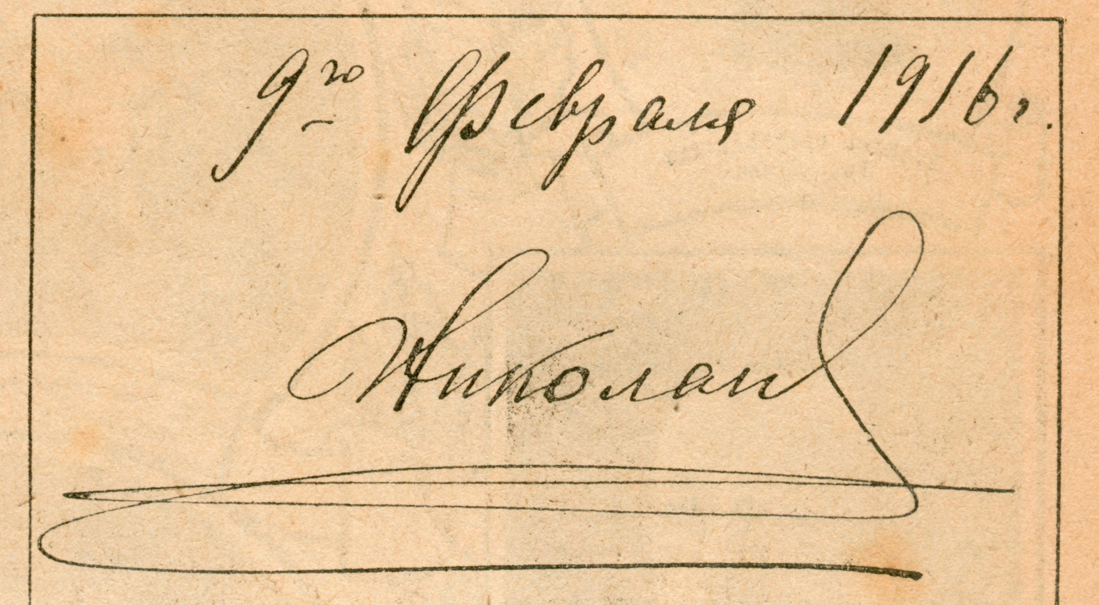 Автограф царя Николая Второго в "Золотой книге почётных посетителей Государственной Думы" (Таврический дворец) 9_февраля_1916_г. (ст. ст.) Журнал Нива, 1916.